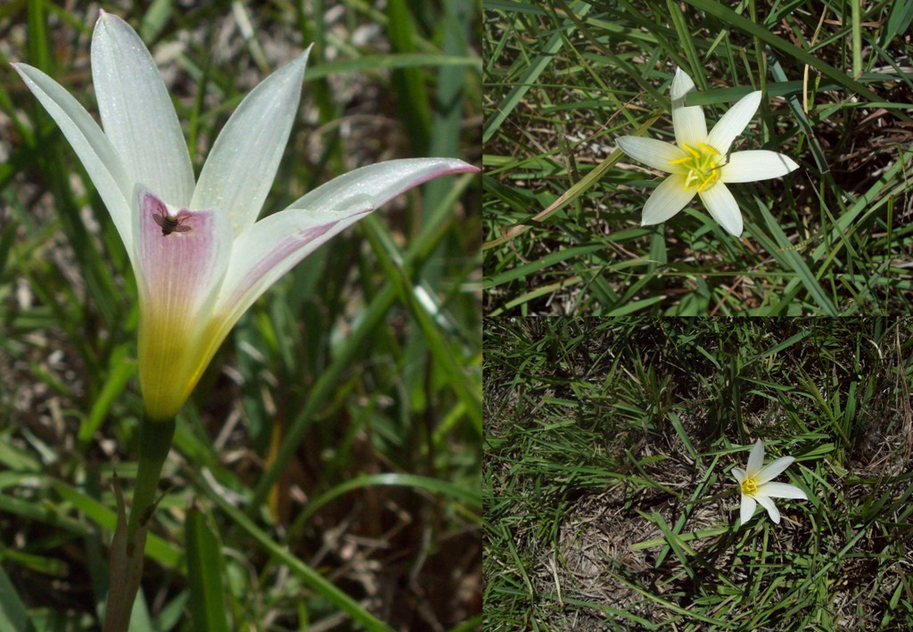 Zephyranthes mesochloa. Amaryllidaceae Fotos tomadas en campo húmedo al márgen del Río Negro y del lago de Palmar, departamentos de Soriano y Río Negro, Uruguay